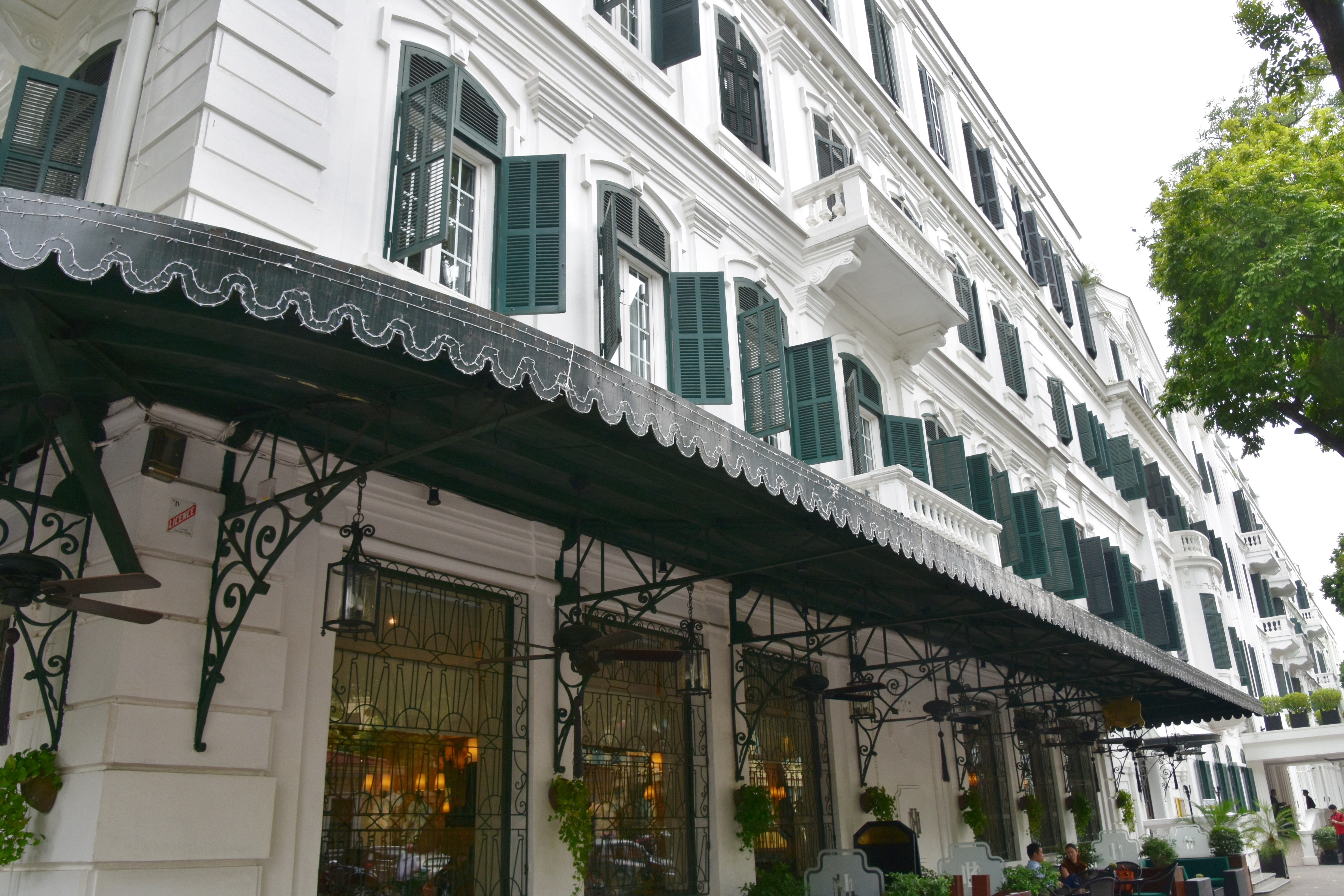 Sofitel Legend Metropole Hotel, Hanoi, 1901 (1)